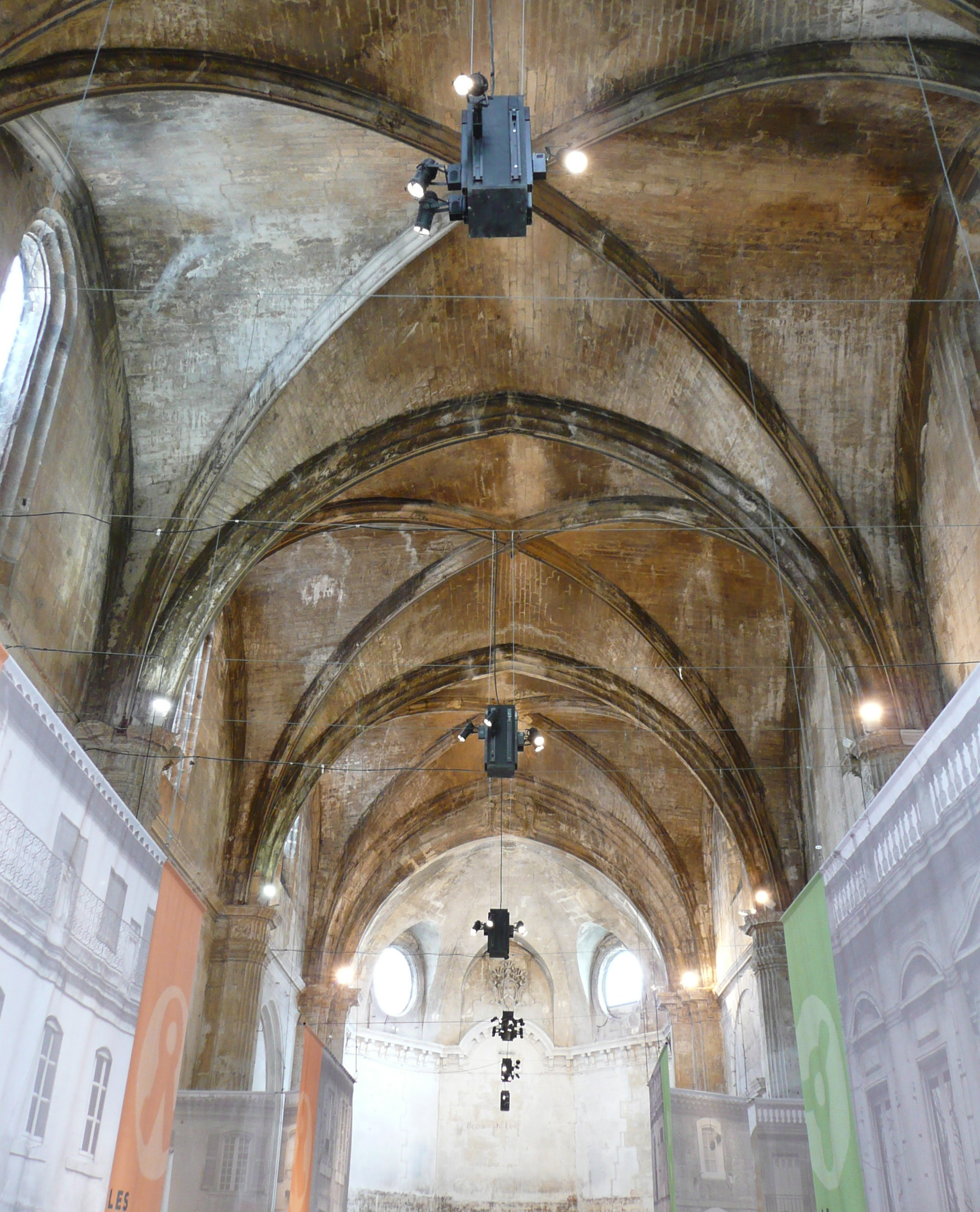 Intérieur de la chapelle des Trinitaires, 38 rue de la République en Arles (13), désaffectée et lieu d'exposition.